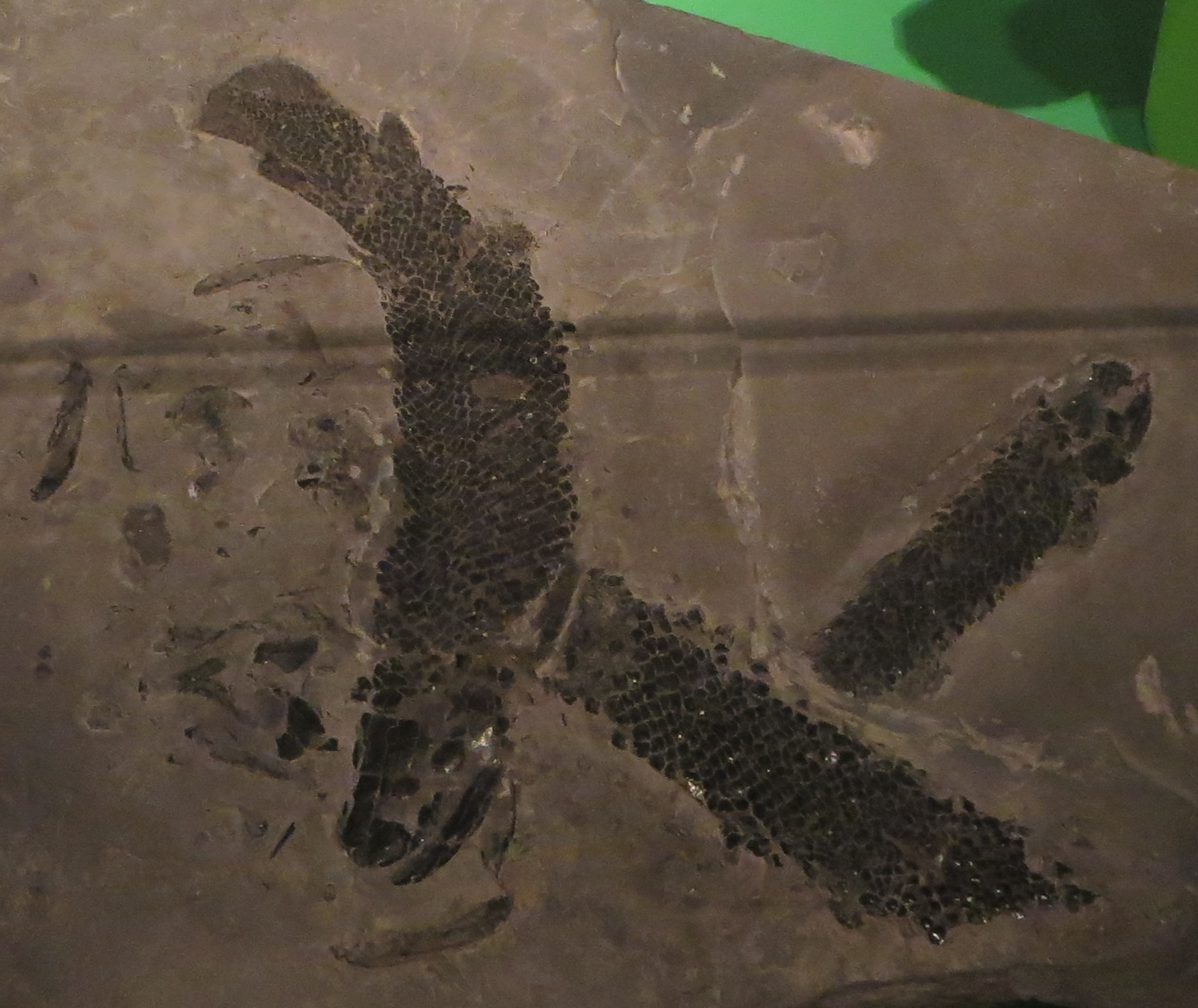 Fossil of Gyroptychius - Took the picture at Museon, Den Haag